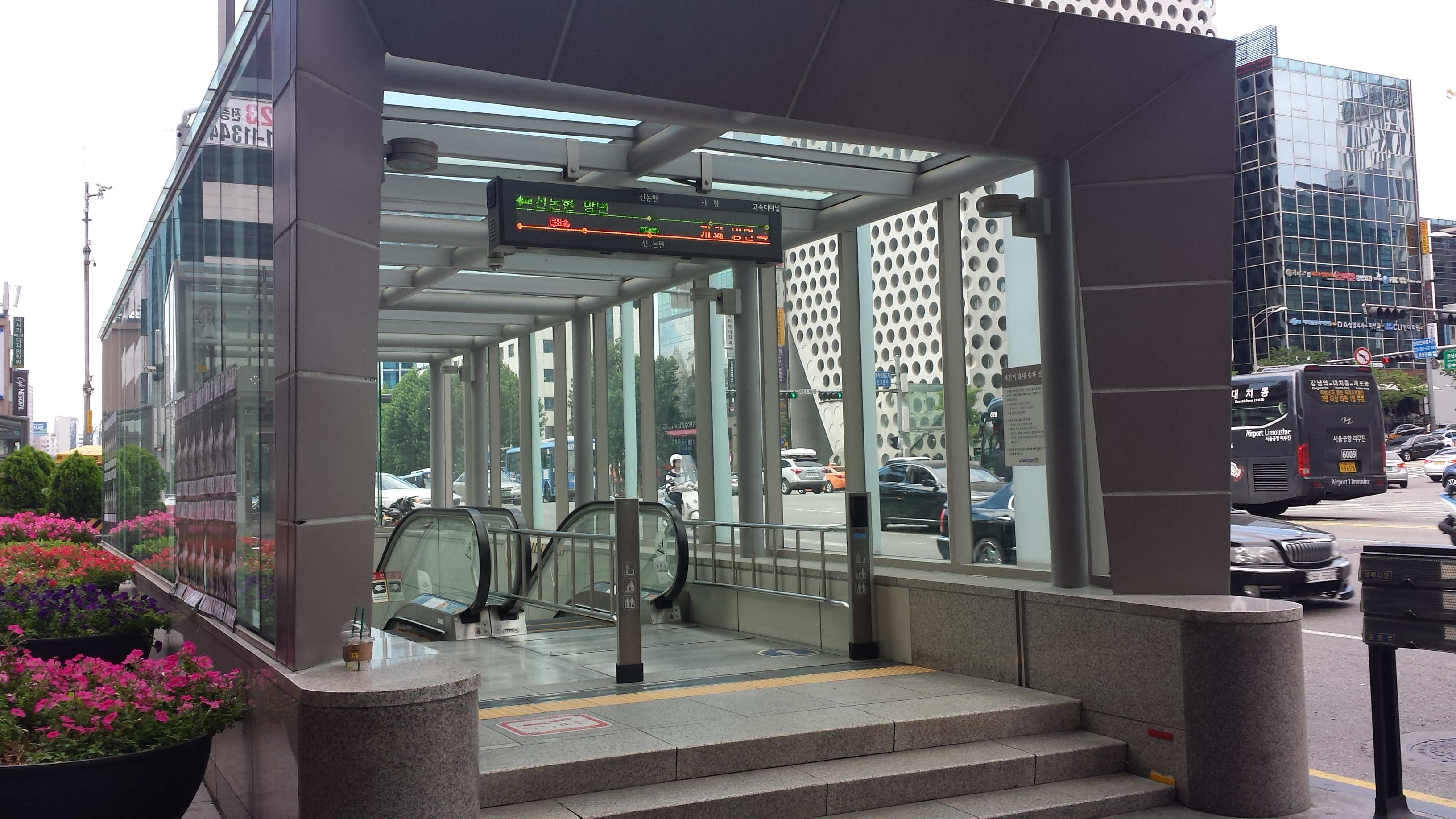 신논현역 6번 출입구.